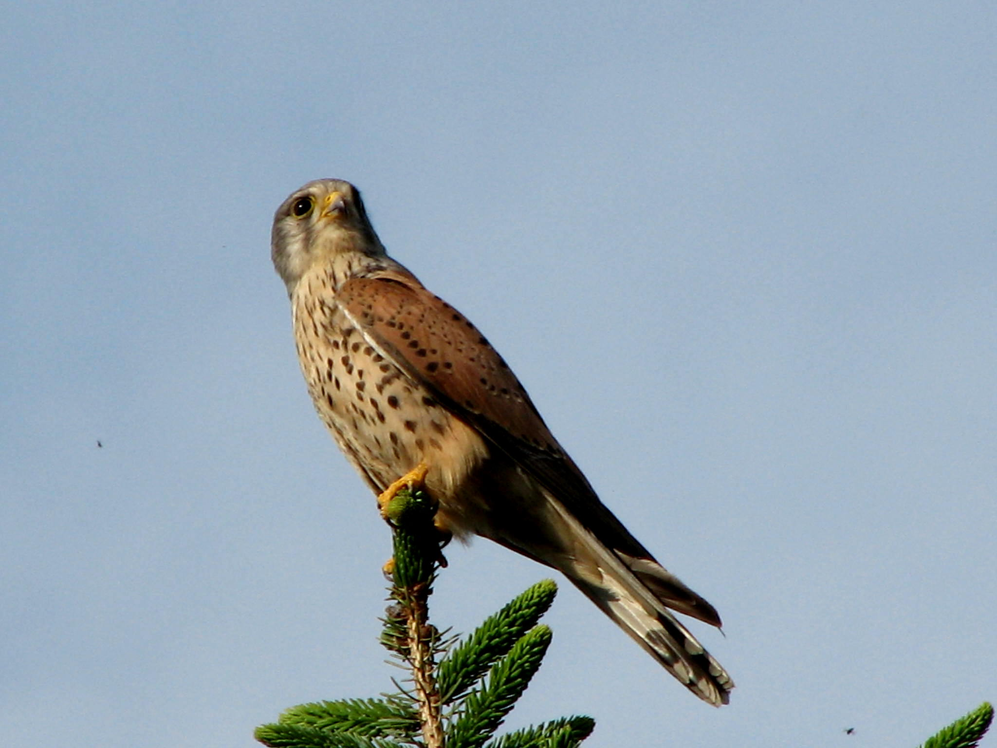 Junger Turmfalke Foto in Meschede Klausenweg